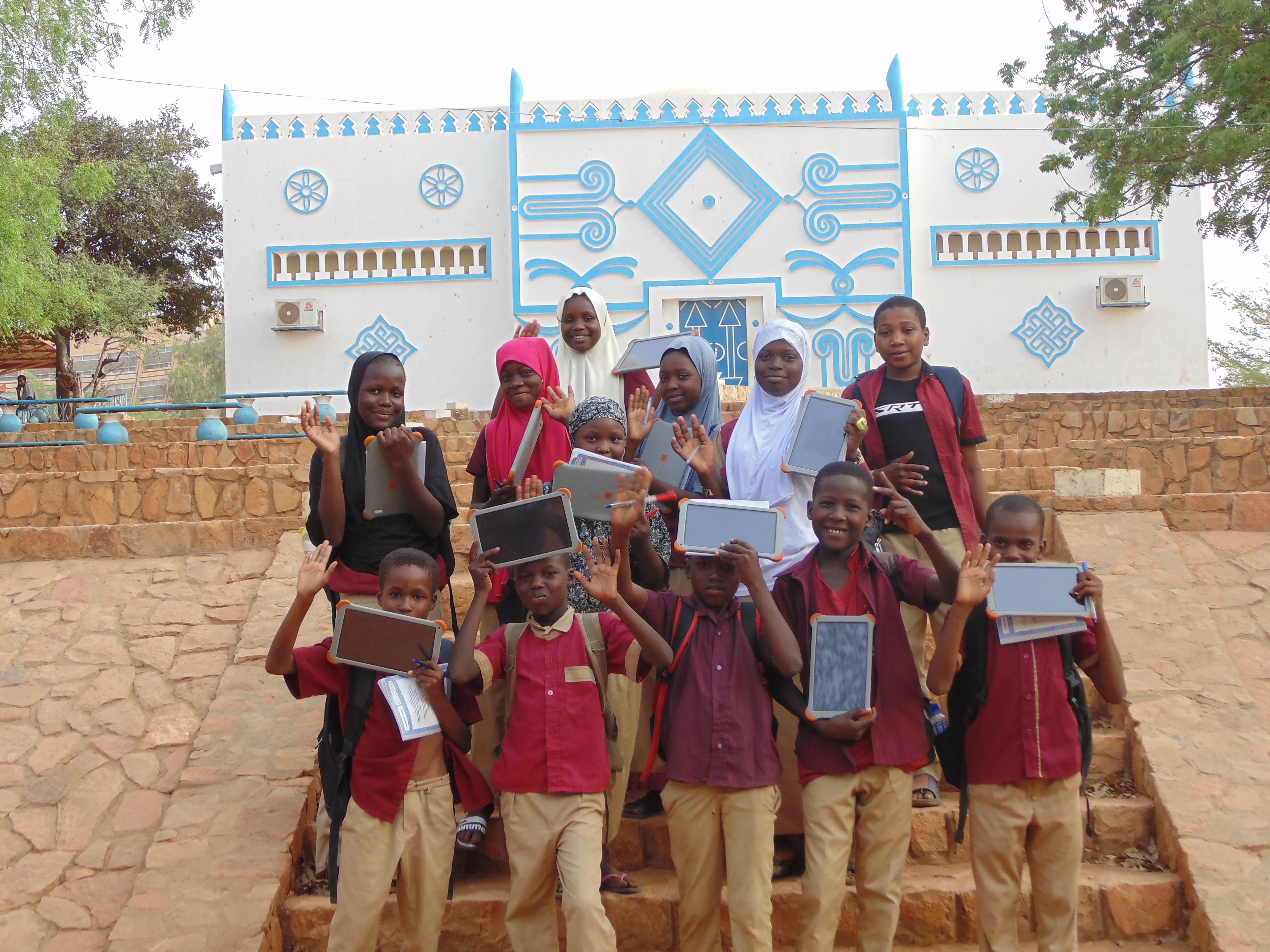 Sortie de l'équipe de l'école Yantala du Niger au musée national dans le cadre du wikichallenge